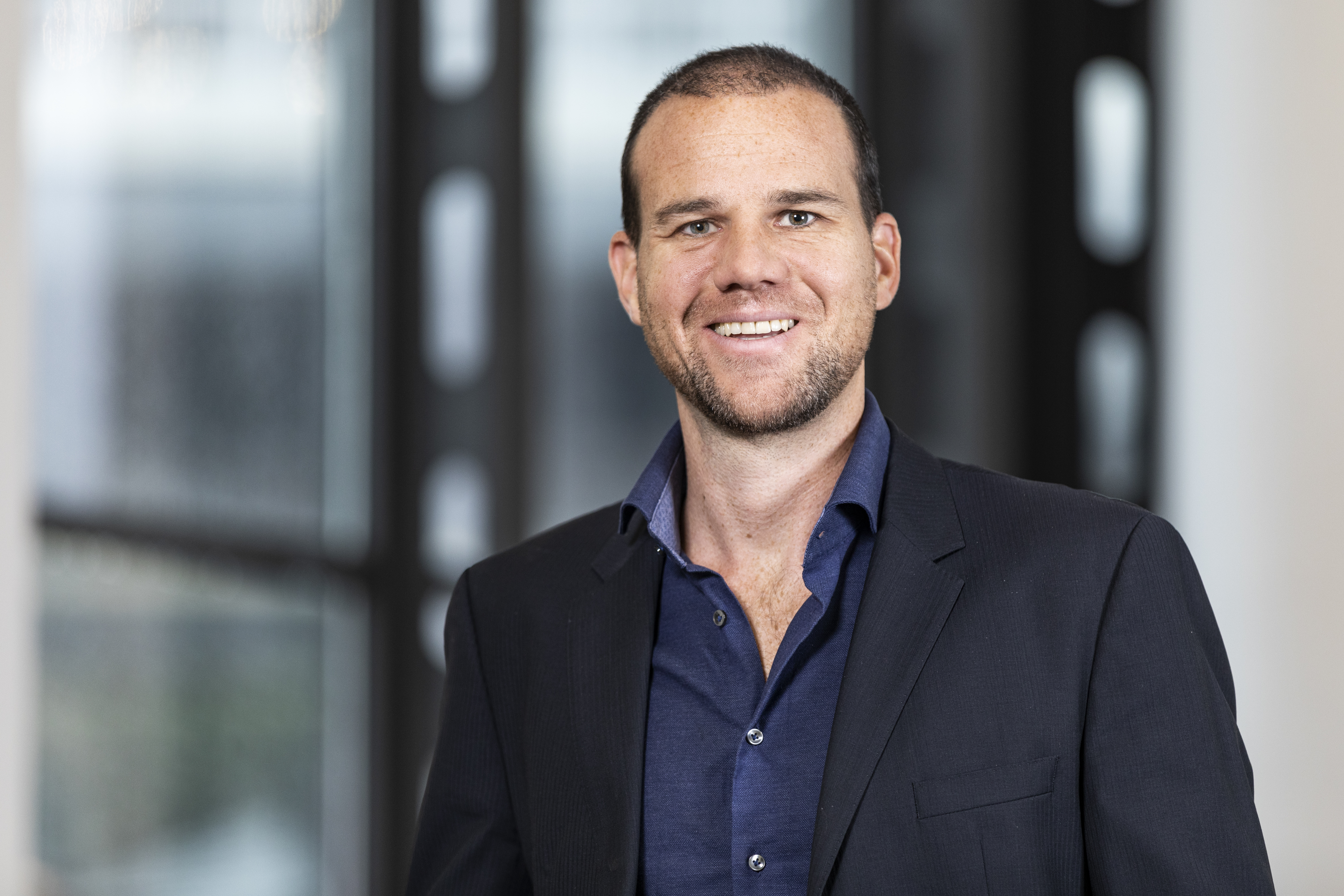 Martin Schröder